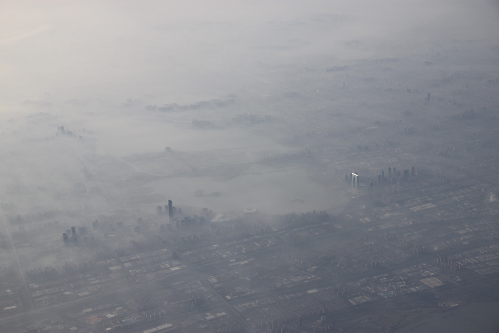 Shanghai, China